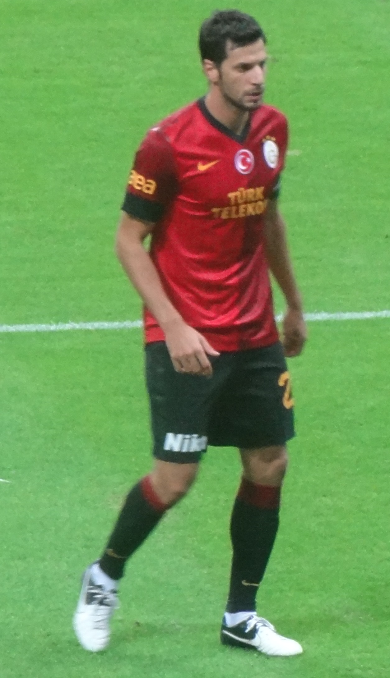 Balta in '12-13 season